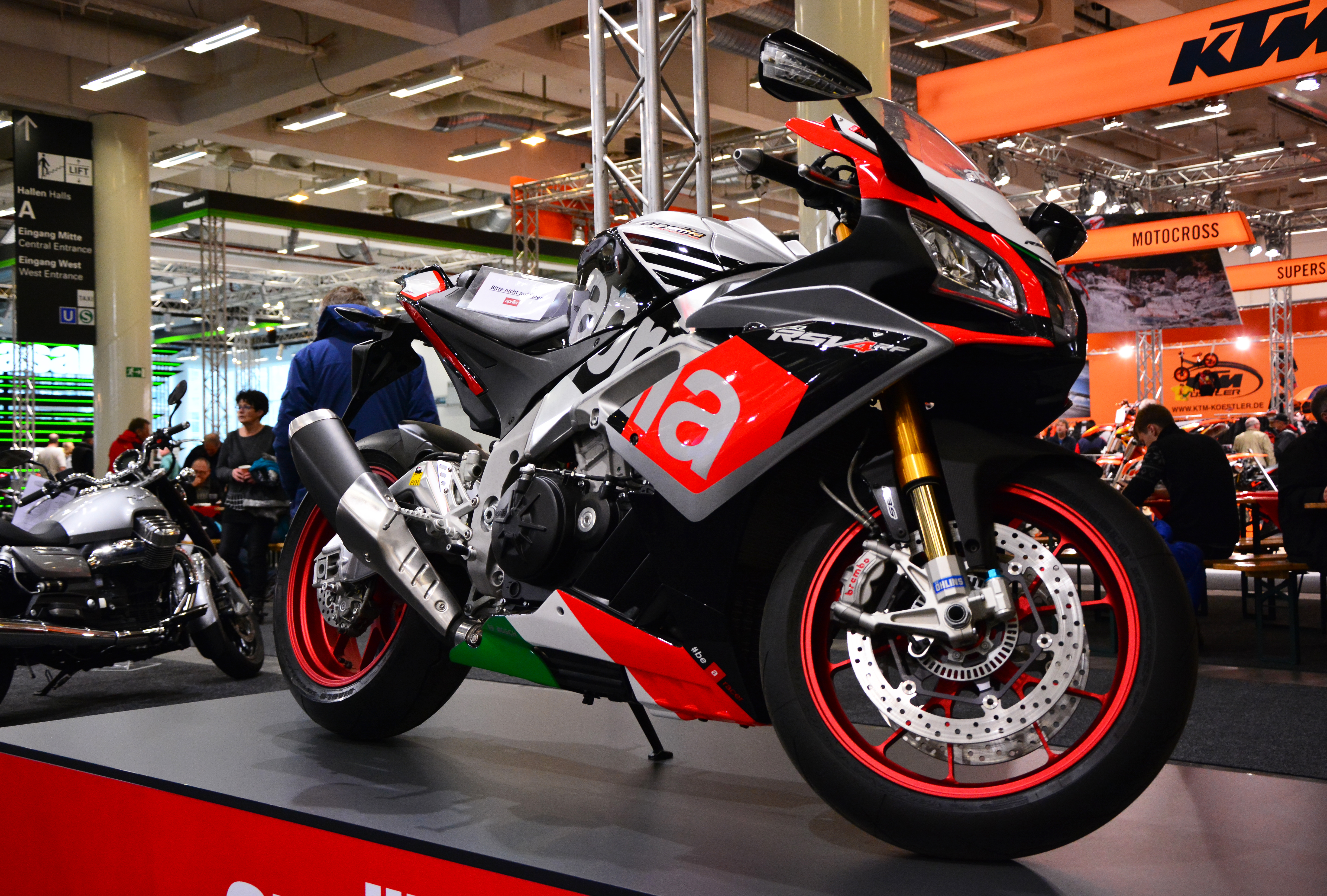 Aprillia_RSV4_RF_(Limited_Edition) bei den Hamburger Motorrad Tagen 2015